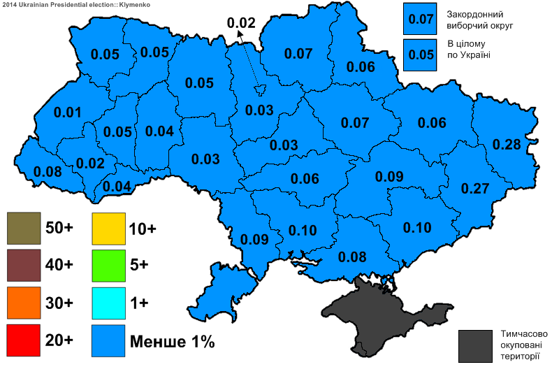 Електоральна підтримка Клименка Олександра Івановича на виборах Президента України 2014.